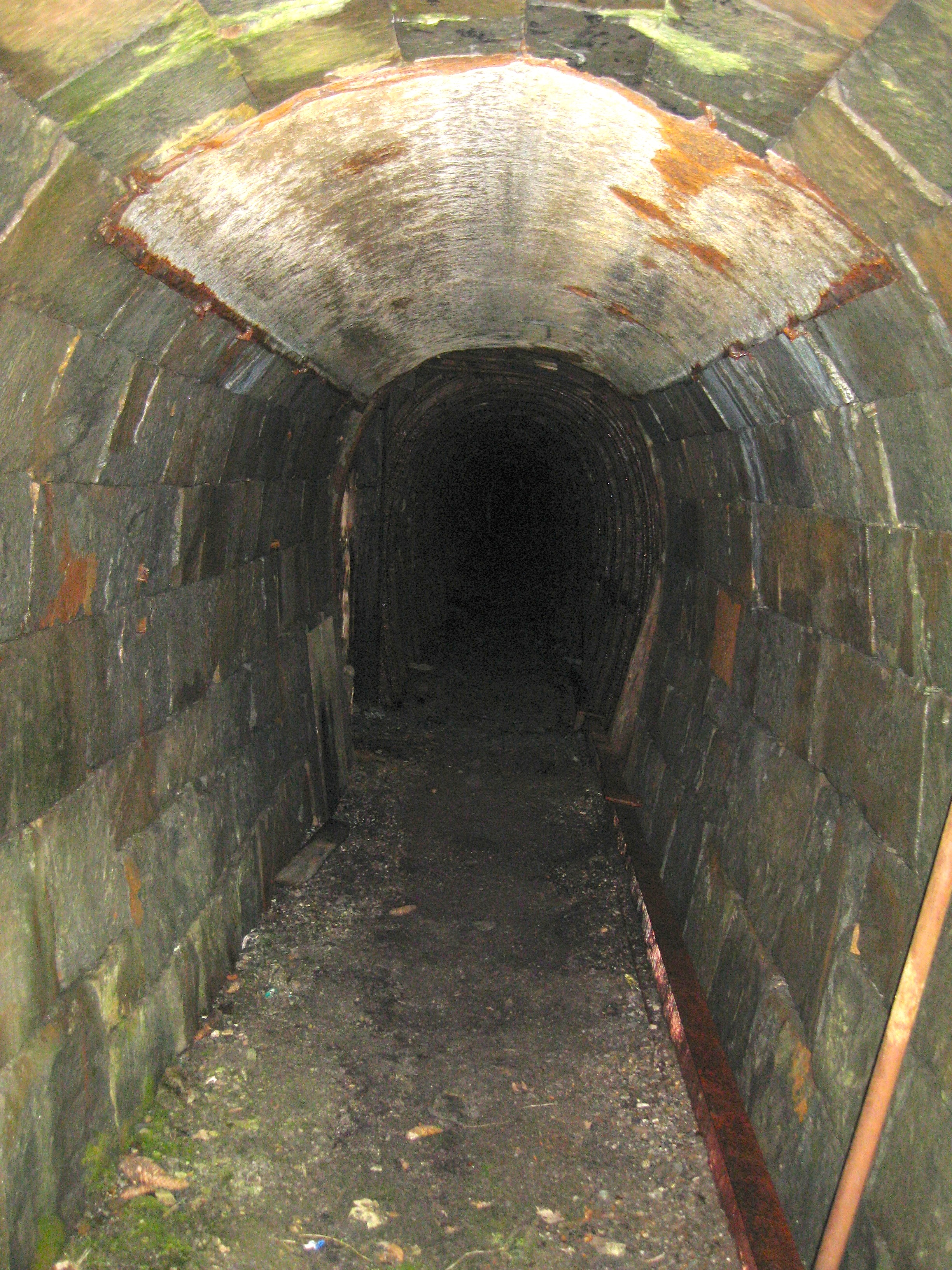 Inneres des Stollens der Grube Güte des Herrn in Lautenthal/ Harz